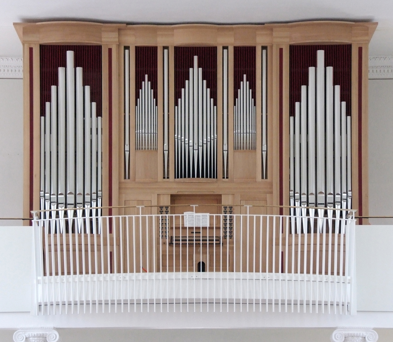 Die neue Matz u. Luge - Orgel zu St. Ludwig, Bad Dürkheim